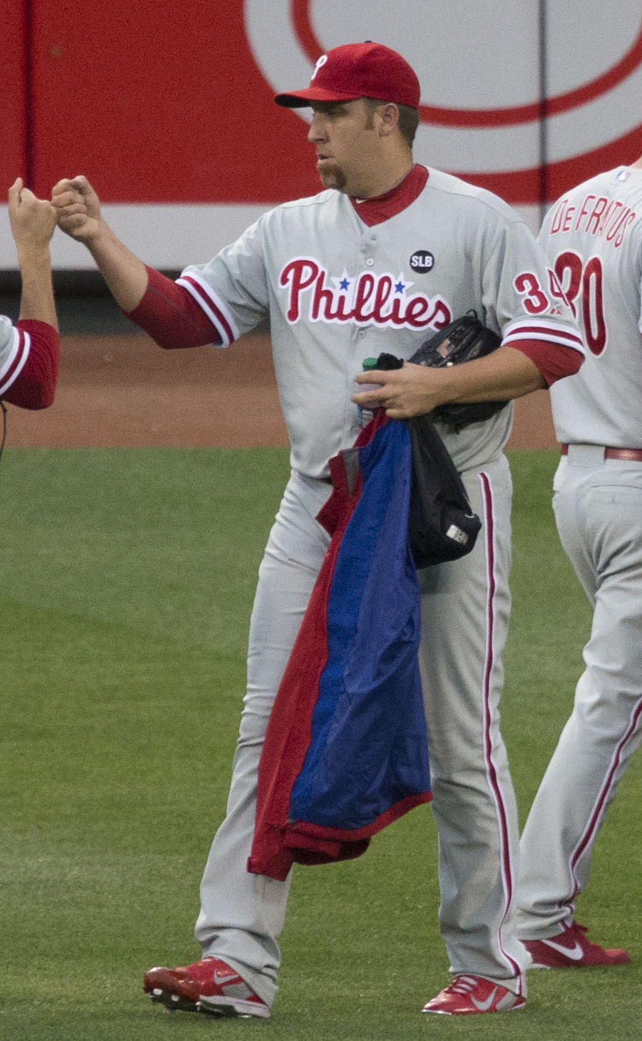 Aaron Harang